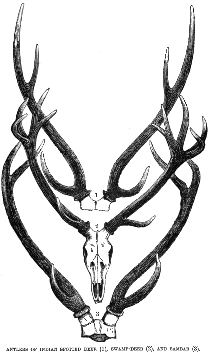 Indian deer antlers